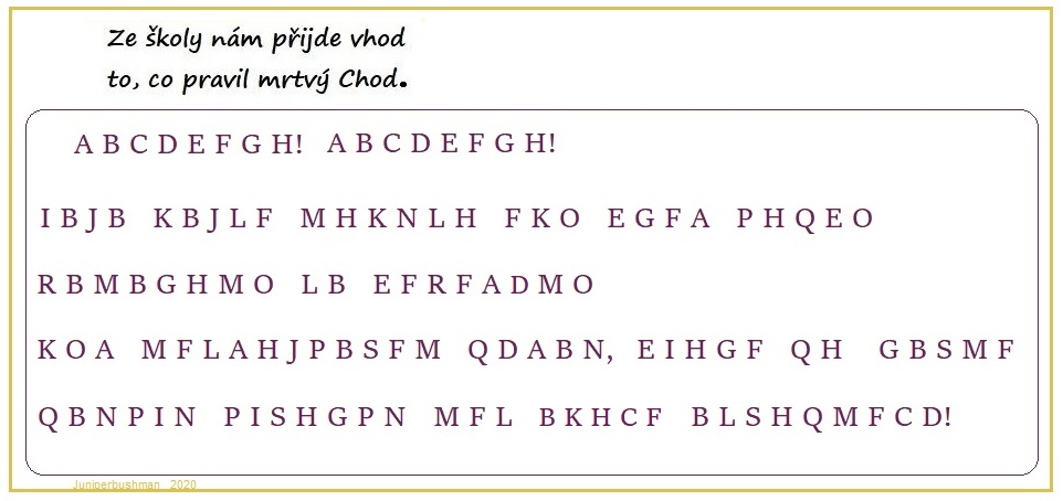 Kryptogram skrývající výrok: „Lomikare! Lomikare! Toho bohda nebude, aby kral cesky ponoreny do kapaliny byl nadlehcovan silou, ktera se rovna souctu ctvercu nad obema odvesnami!“